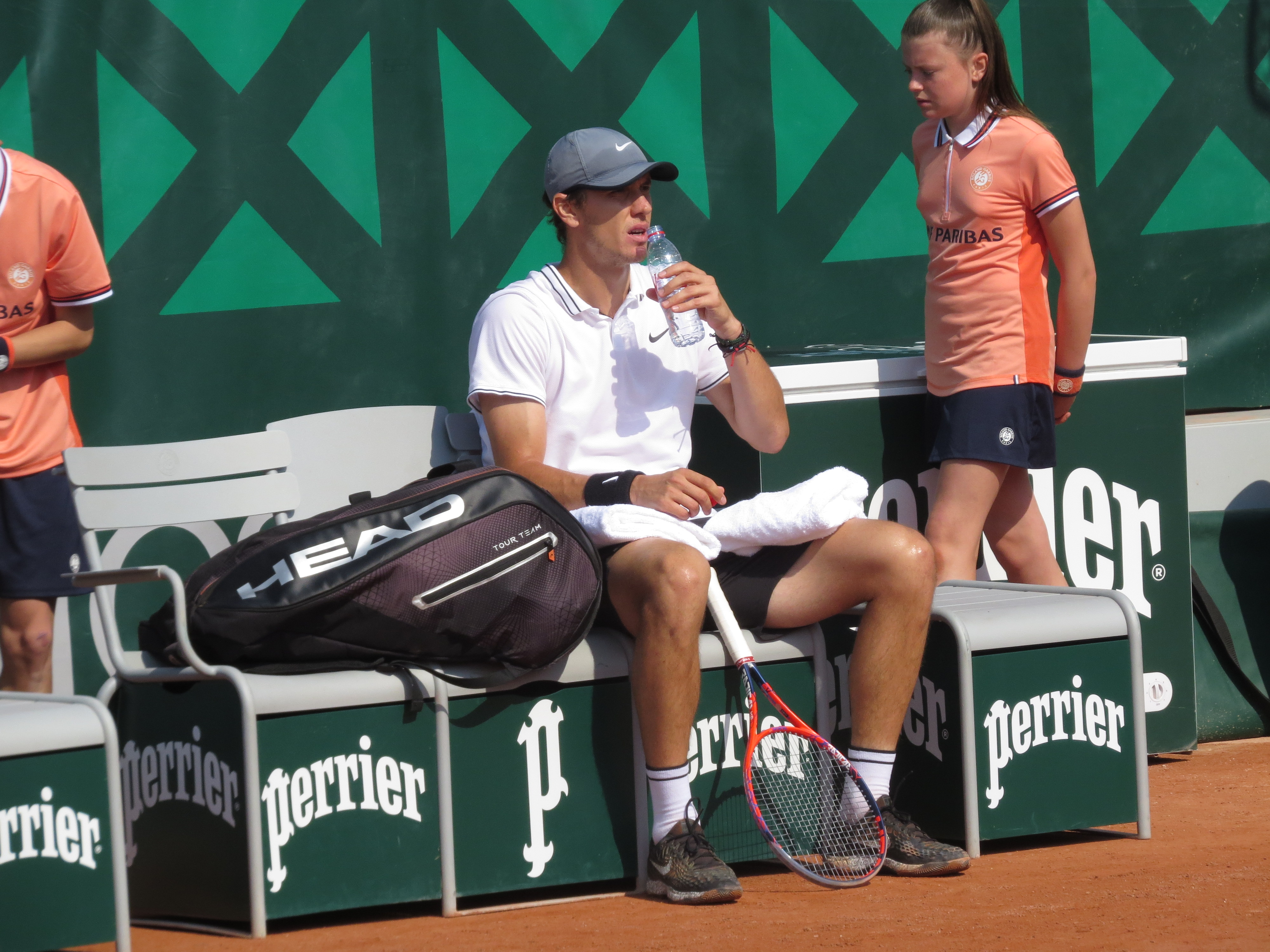 Egor Gerasimov lors de son premier tour des qualifications.